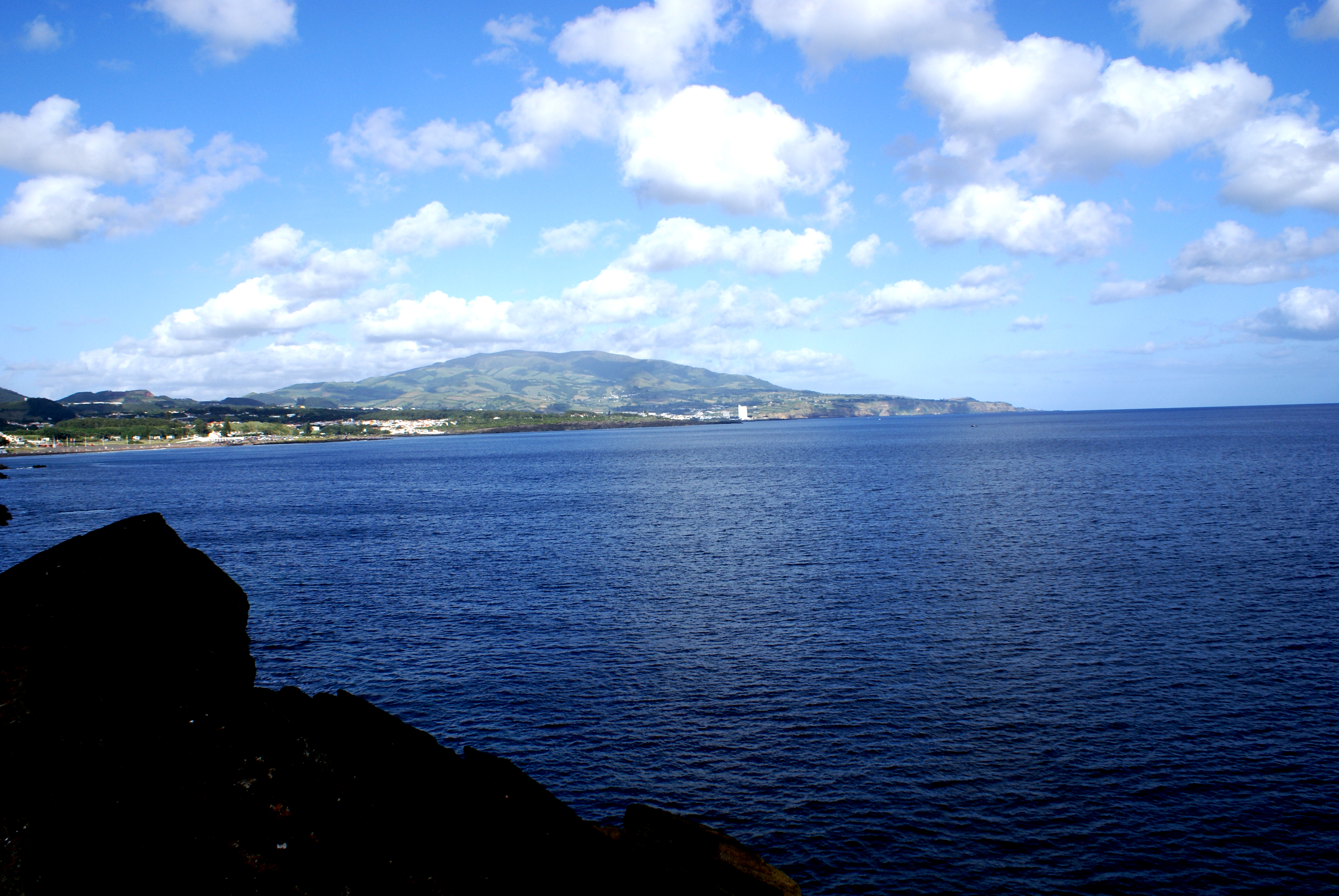 Miradouro do Ilhéu de São Roque, São Roque, Ponta Delgada, ilha de São Miguel, Açores